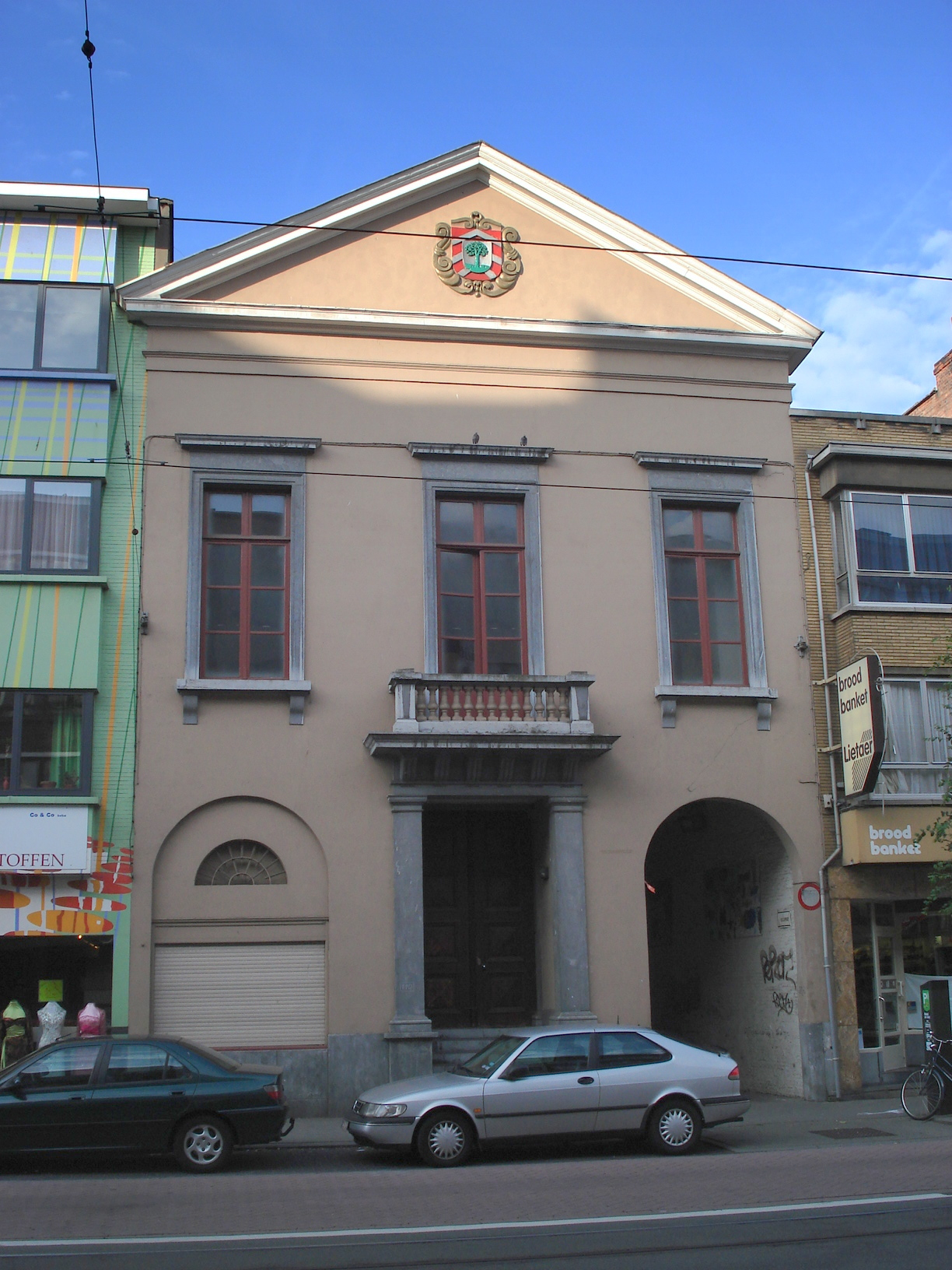 Antwerpen (België), distr. Borgerhout. Het 'Reuzenhuis', Turnhoutse Baan nr. 110, begin 19e eeuw in classicistische stijl opgetrokken, ter vervanging van het zich aldaar bevindende reuzenmagazijn. Was tot 1890 gemeentehuis van Borgerhout, d.i. totdat het gemeentehuis op het Moorkensplein in gebruik werd genomen. In fronton: wapenschild van Borgerhout. Poort rechts is de Reuzenpoort, die toegang verleent tot de Reuzengang erachter.